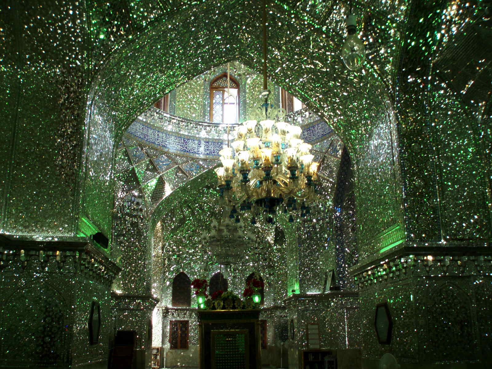 Imamaden mosque interiors, Shiraz.